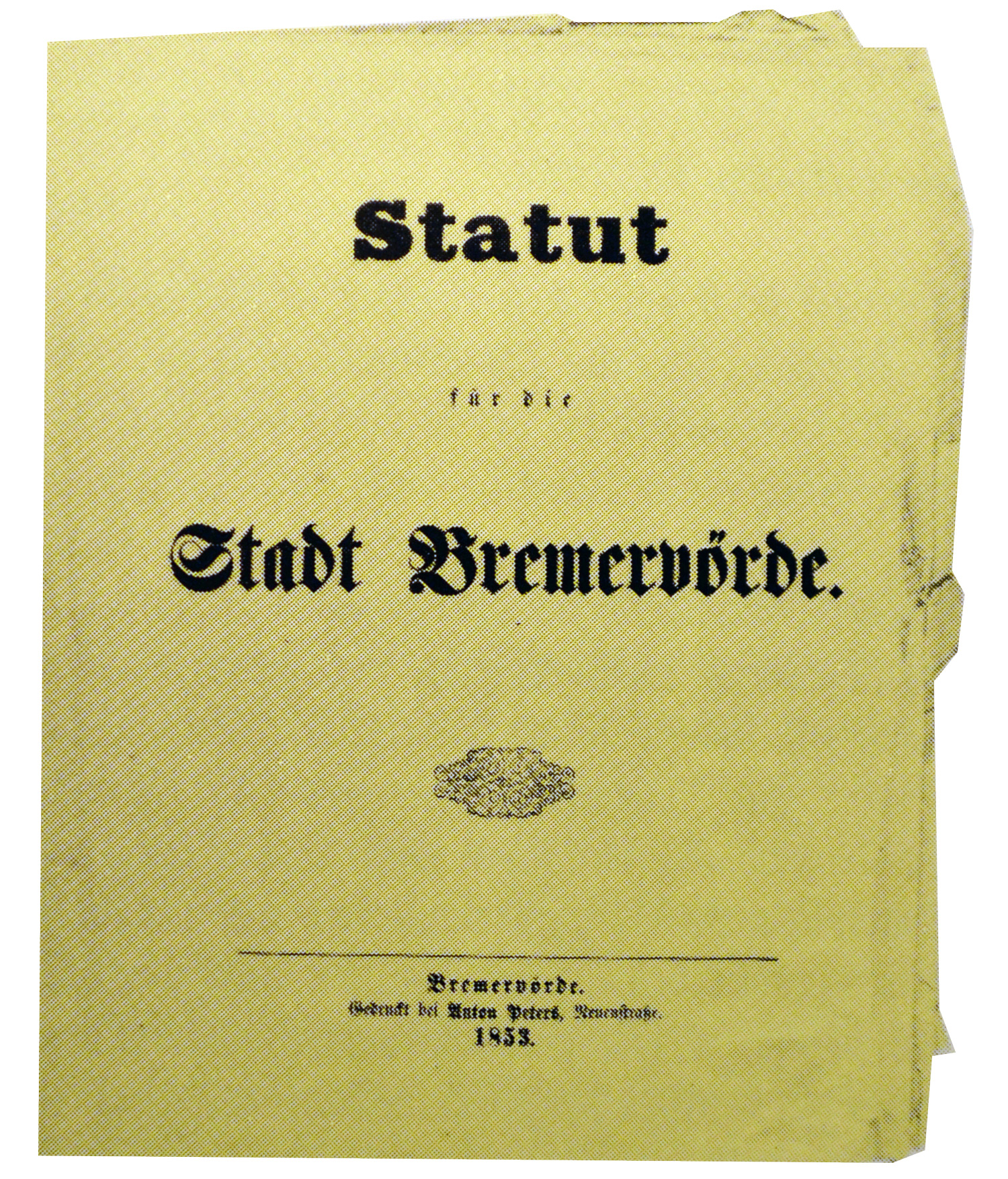 Statut der Stadt Bremervörde, 1853.